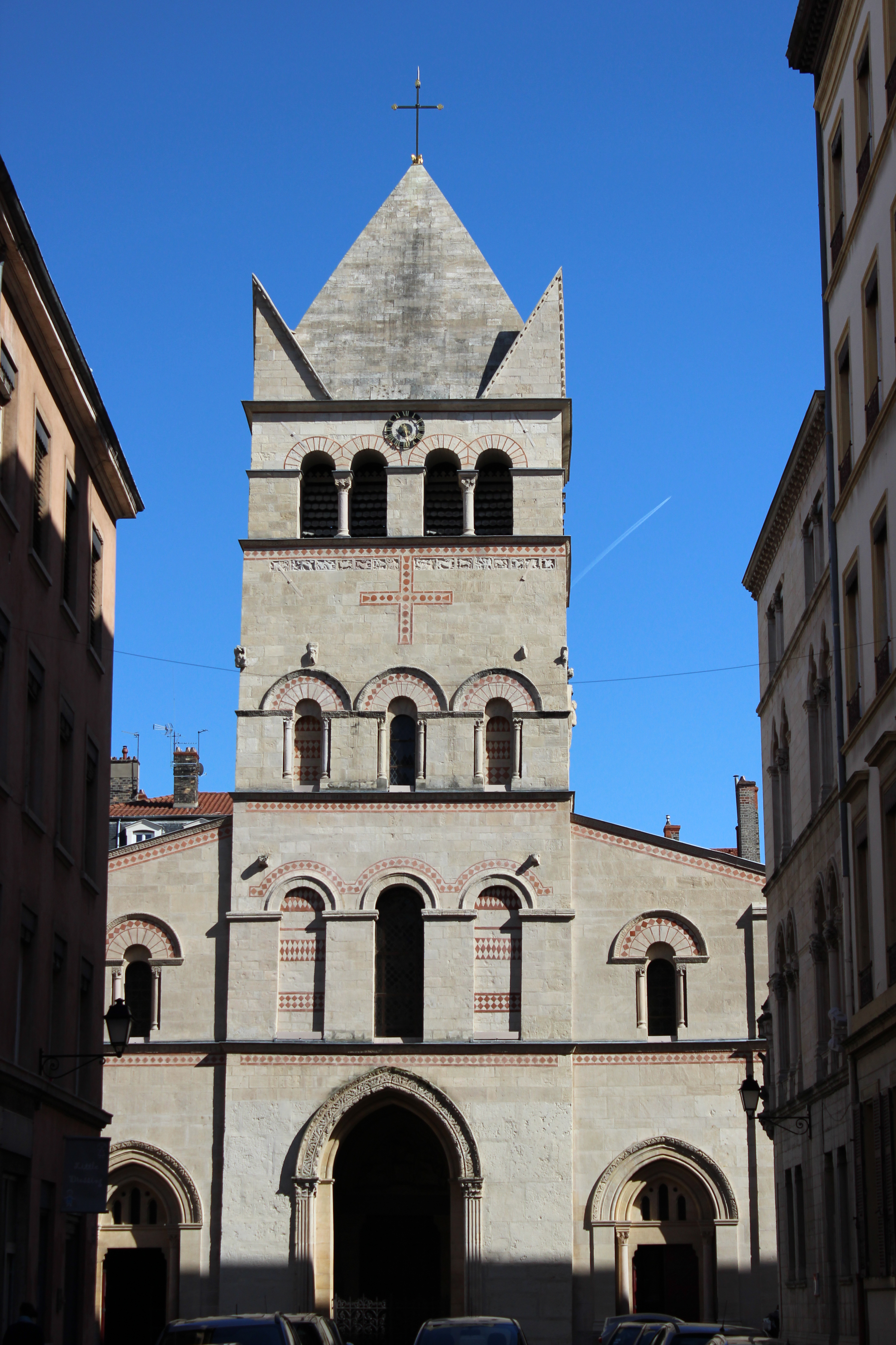 Église Saint-Martin-d'Ainay à Lyon.